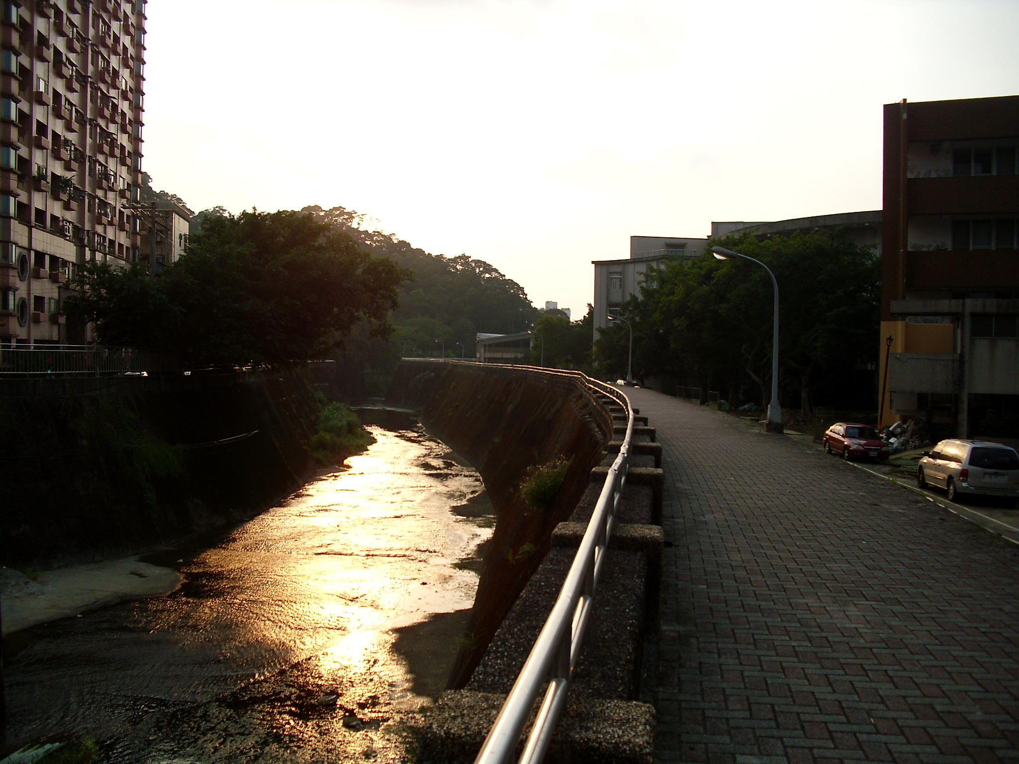 中文（台灣）: 日落─暮送夕陽步長堤（政治大學）。